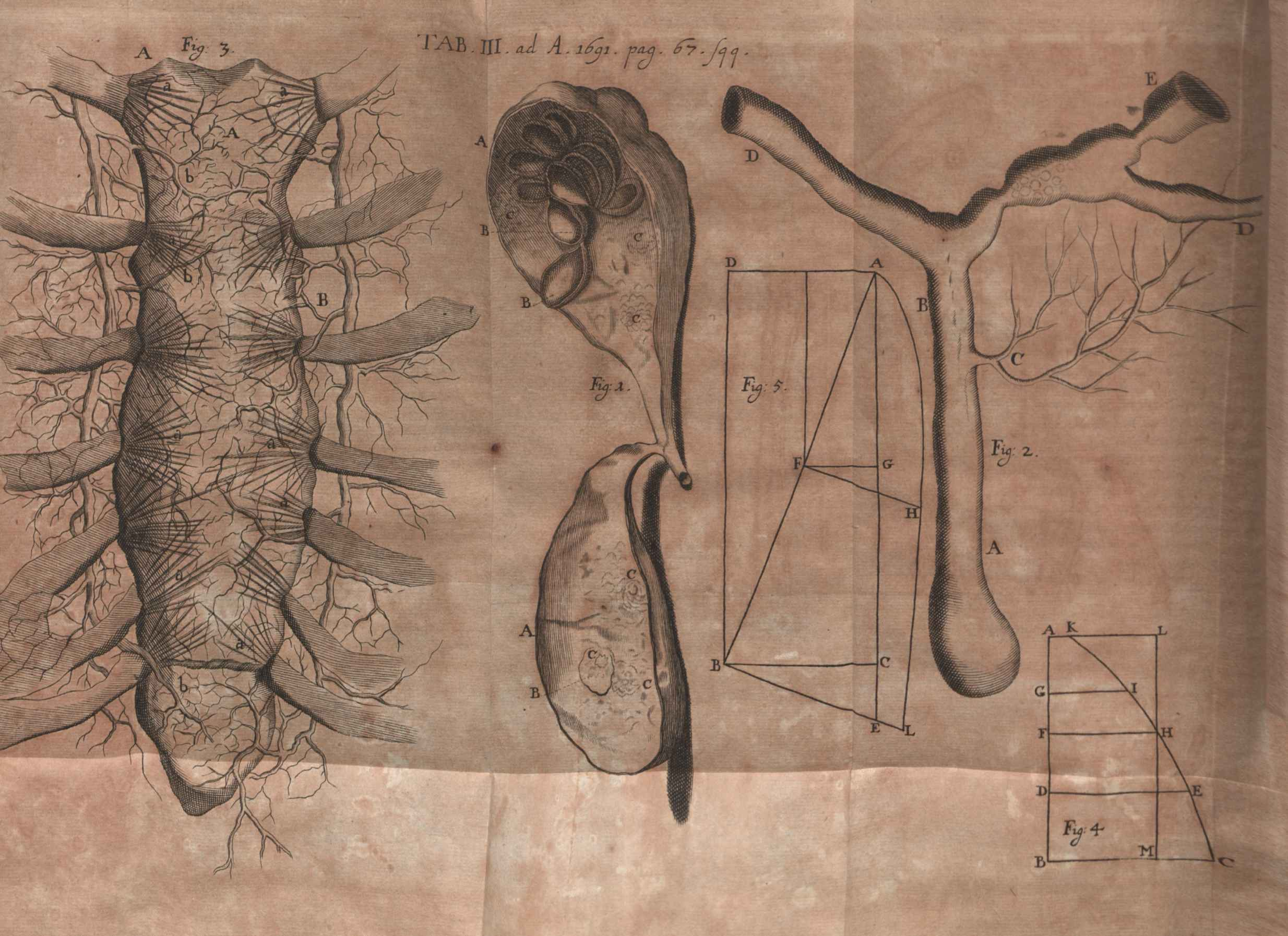 Illustration